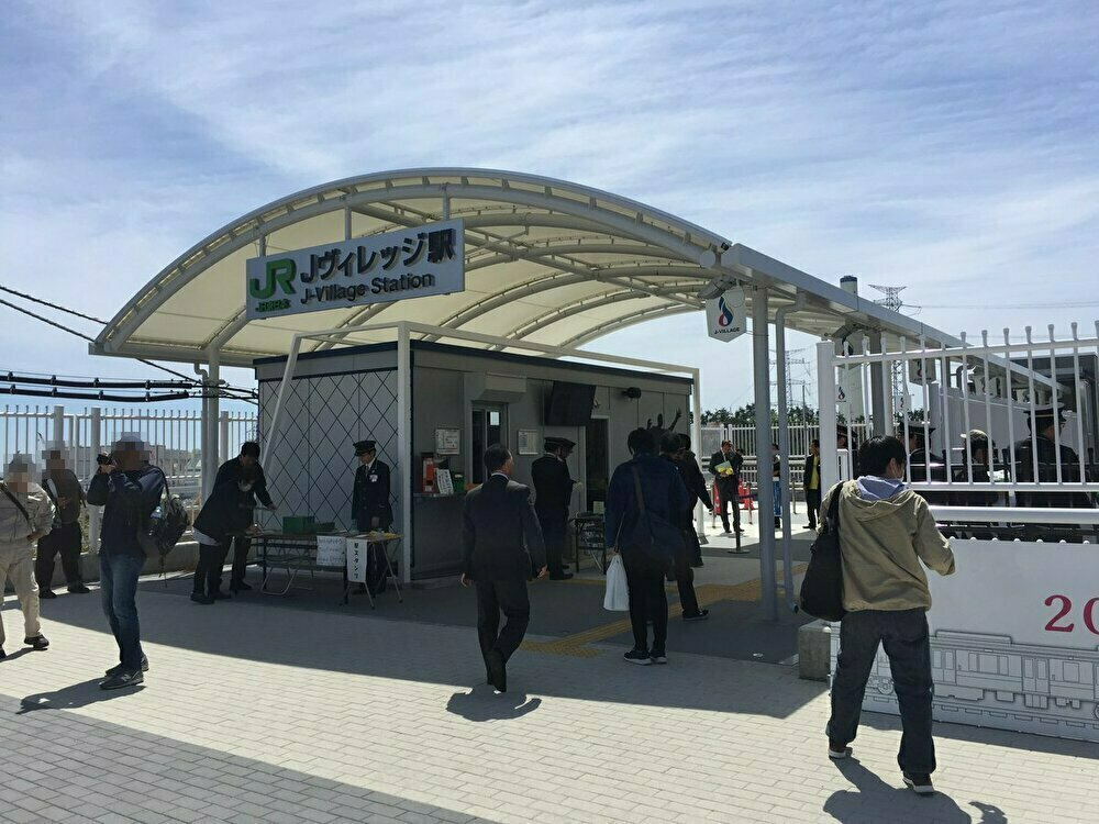 開業日(2019年4月20日)のJヴィレッジ駅入口